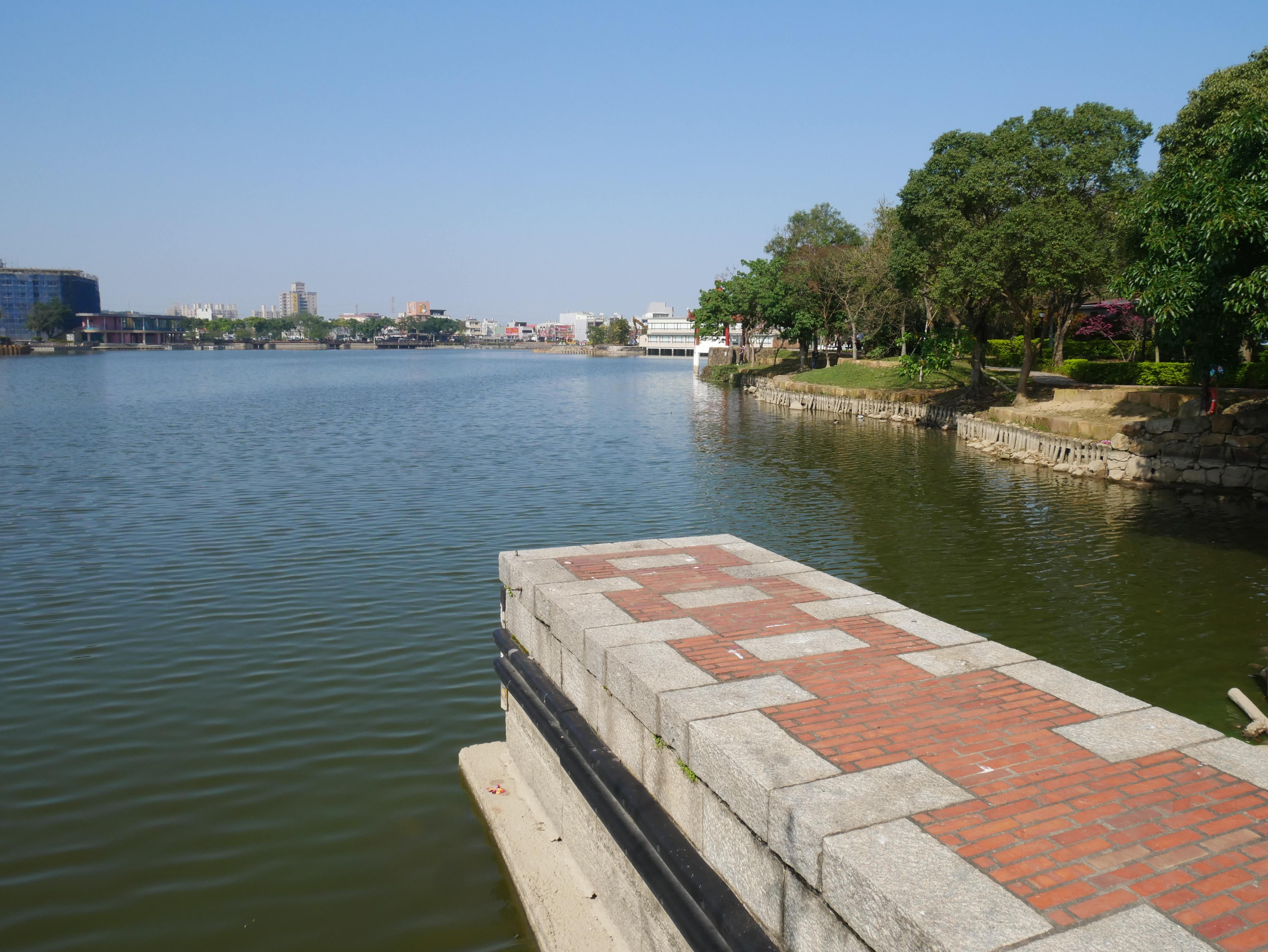 龍潭大池南岸碼頭，桃園市龍潭區上林里